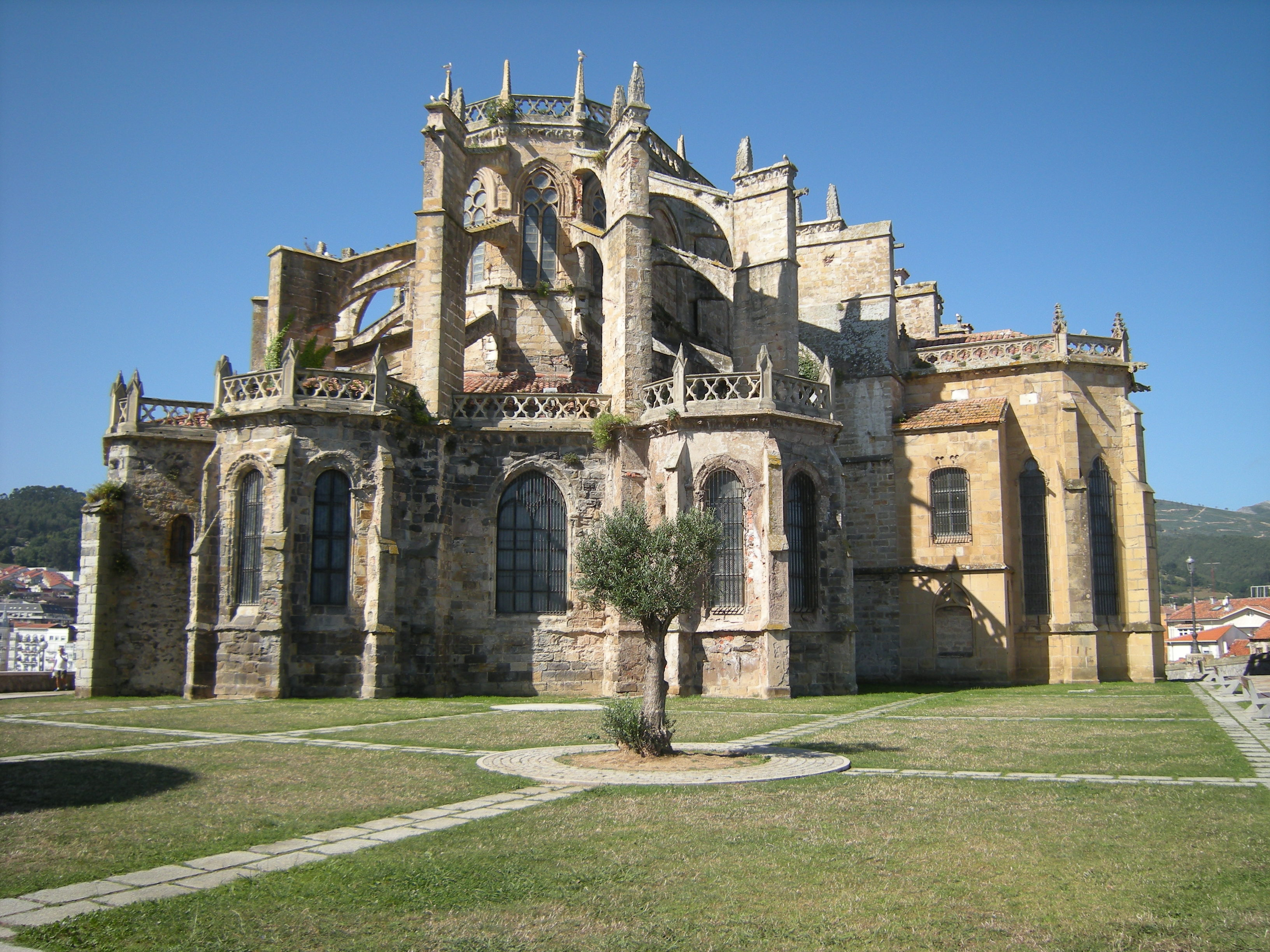 Iglesia de Santa María de La Asunción de Castro-Urdiales (Cantabria, España).